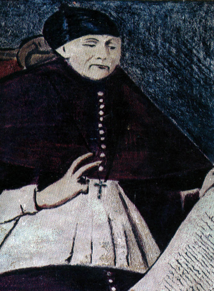 Don Mariano Martí, (Bráfim, Tarragona, 1720 - Caracas, 1792), Obispo de la Diocesis de la Provincia de Venezuela 1771-1792